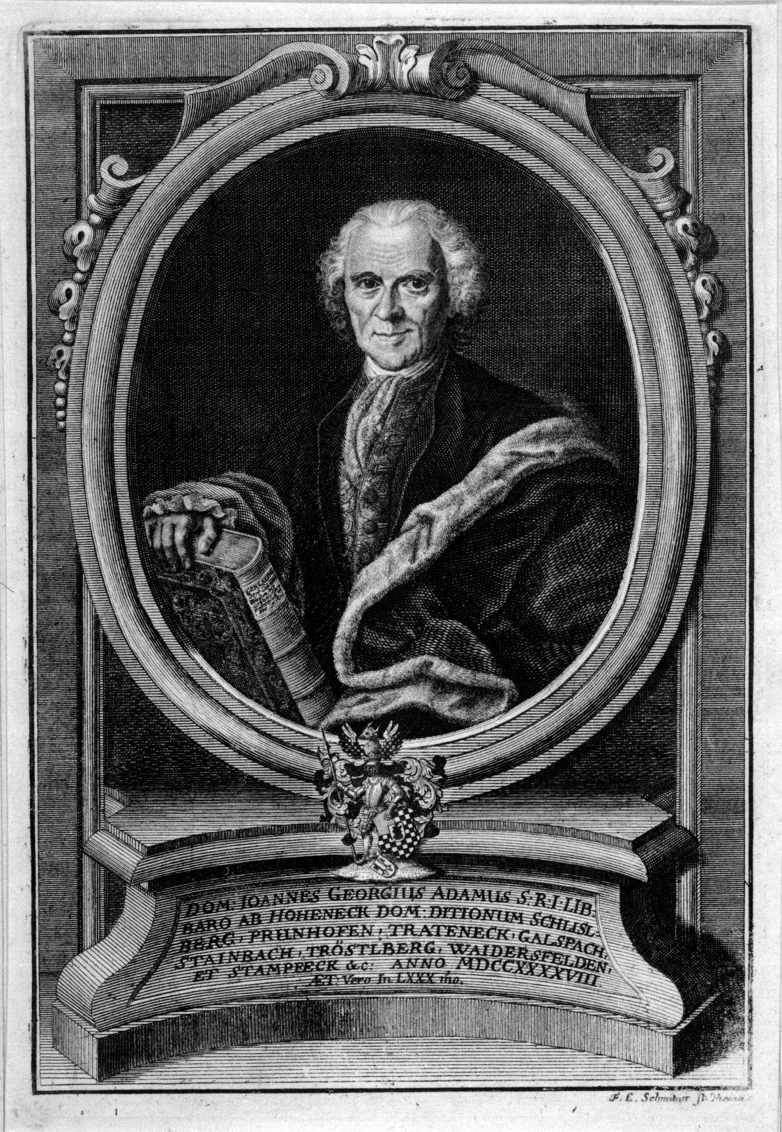 Portrait Johann Georg Adam von Hohenecks (1669–1754), Kupferstich. Bildunterschrift: DOM: IOANNES GEORGIUS ADAMUS S:R:I:LIB: BARO AB HOHENECK DOM: DITIONUM SCHLISL- BERG, PRUNHOFEN, TRATENECK, GALSPACH, STAINBACH, TRÖSTLBERG, WAIDERSFELDEN, ET STAMPFECK &c: ANNO MDCCXXXXVIII. AET: Vero In LXXX mo.